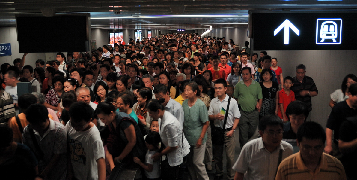 地铁10号线换乘 北京 (Beijing Subway)